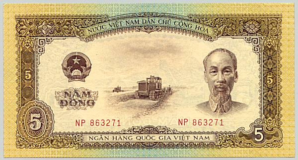 Vietnam 5 Dong 1958 Averse